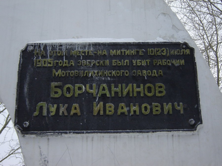 Мемориальная доска в память о Л.И.Борчанинове на памятнике борцам революции на горе Вышке. Мотовилихинский район г. Перми